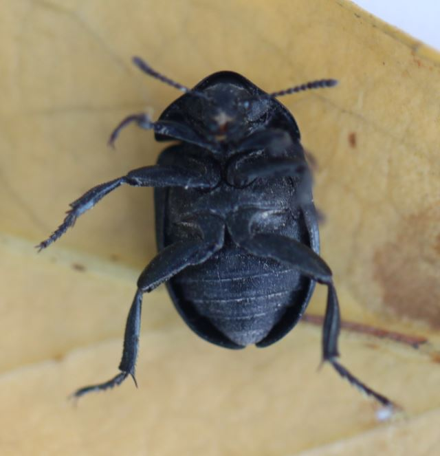 Ablattaria laevigata am 7. April 2018 südlich von Mannheim